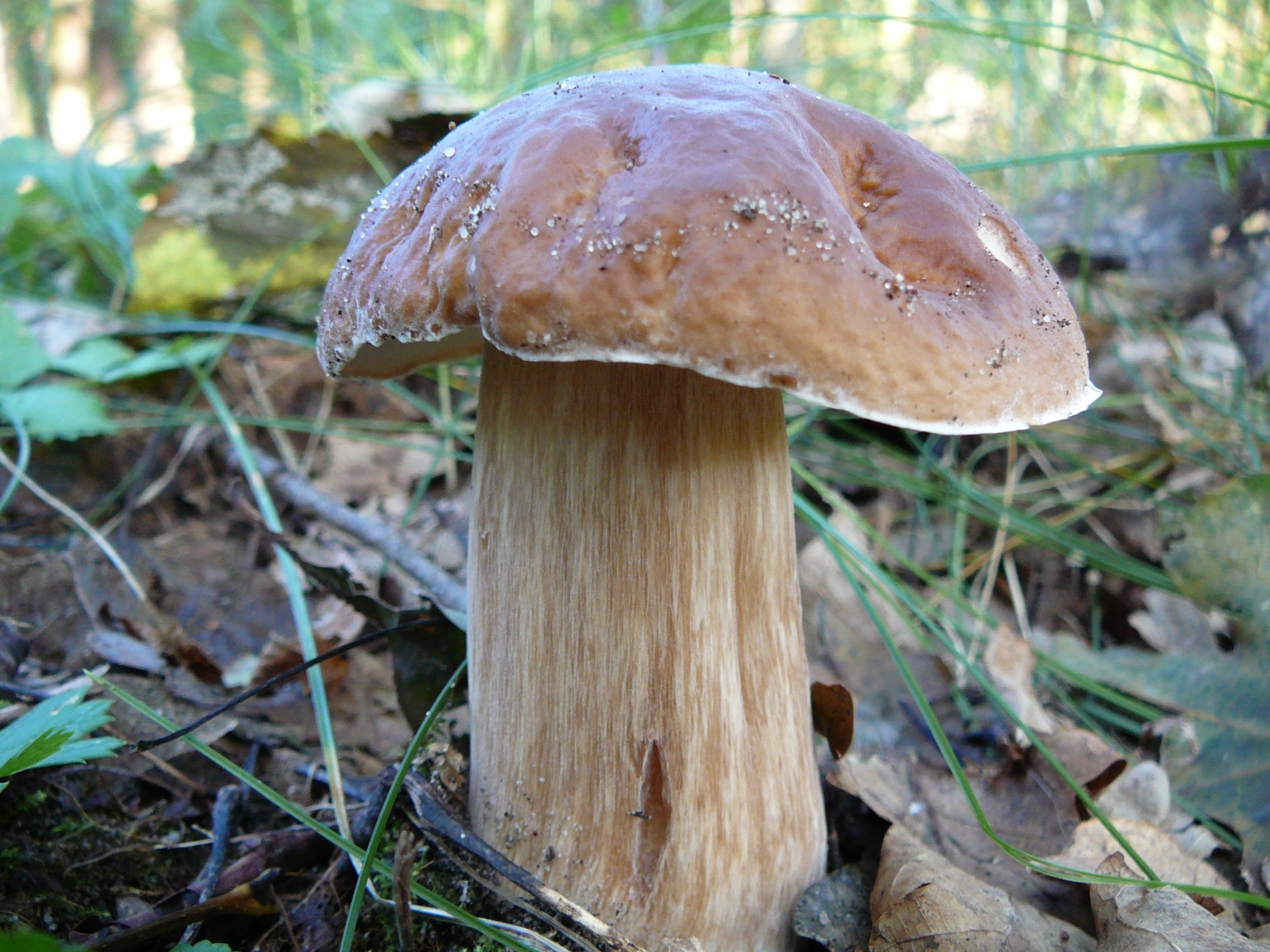 Borowik sosnowy